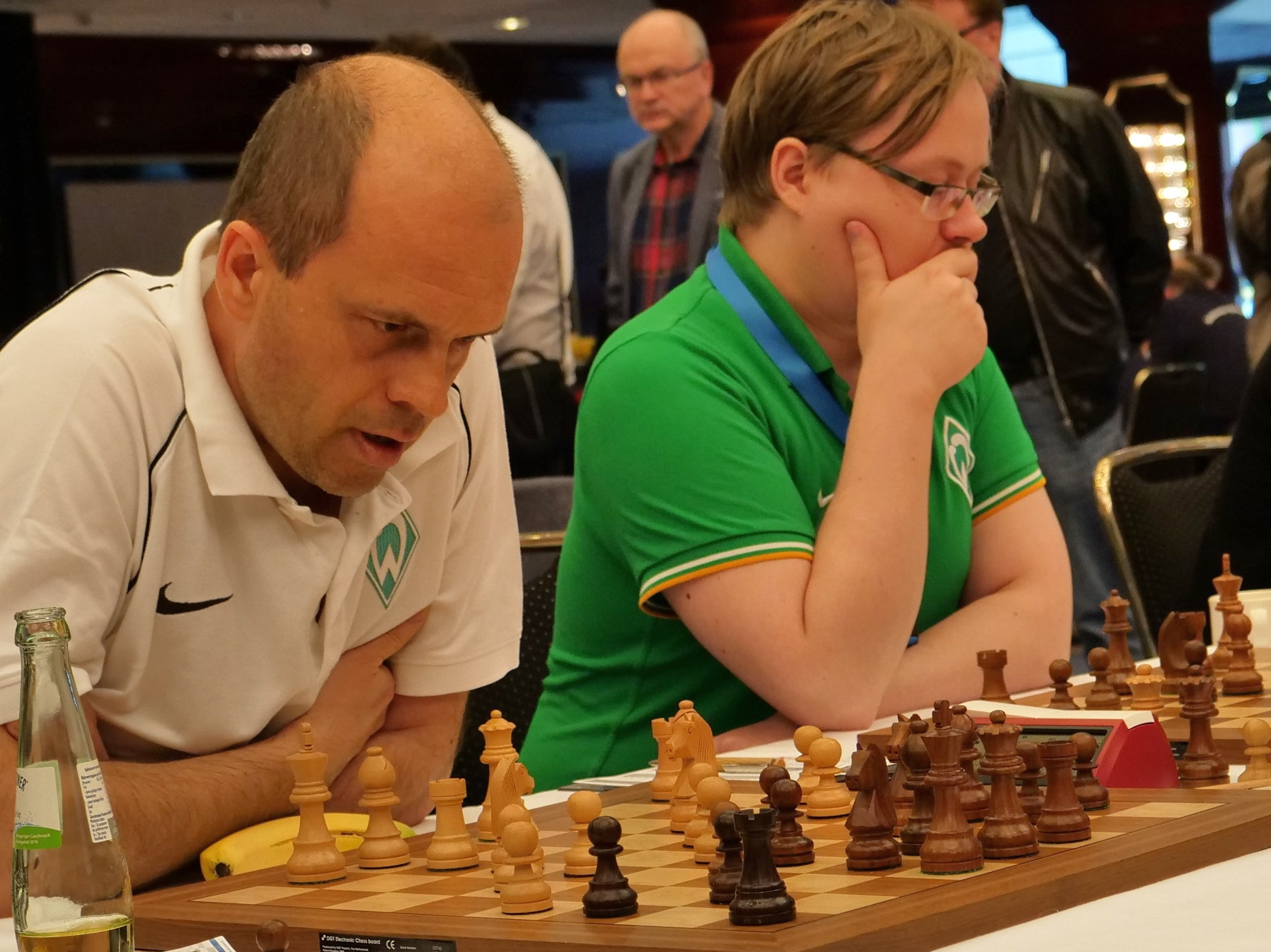 Hracek und Nyback in der Bundesliga-Endrunde 30-4-2018